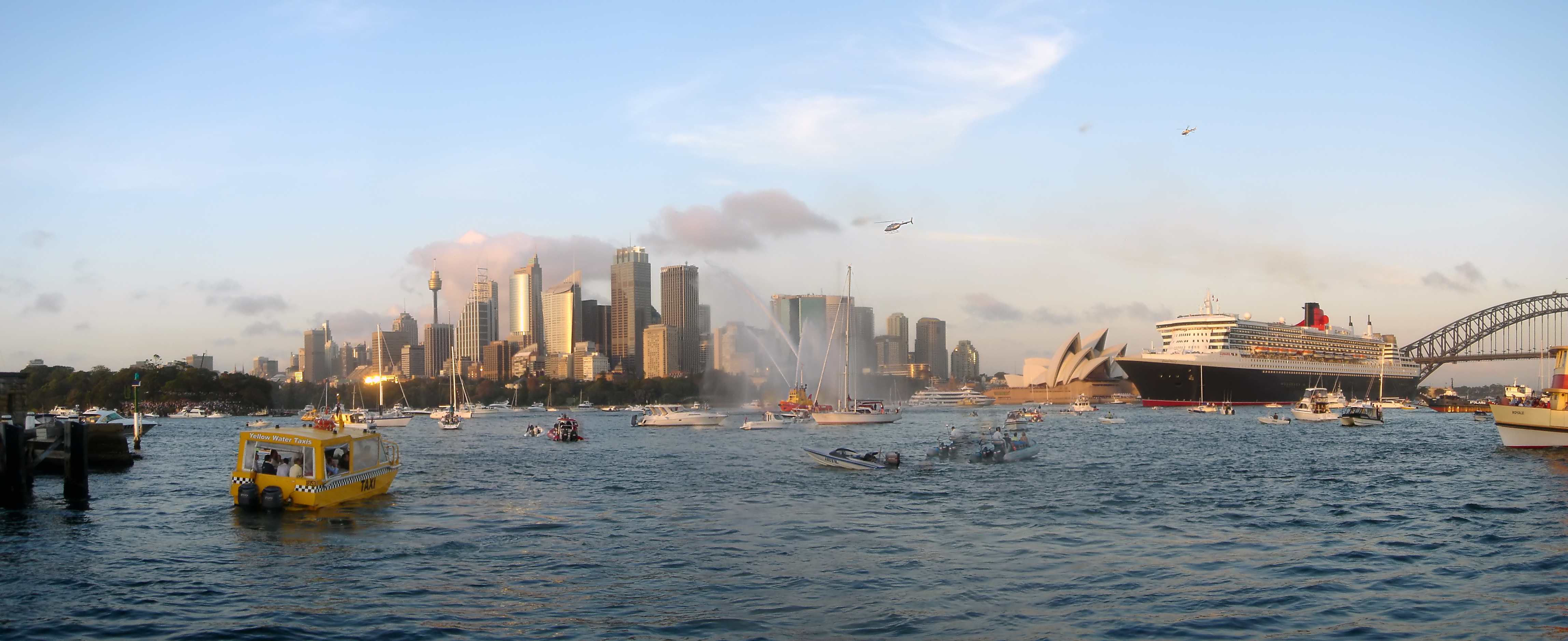 self taken photo